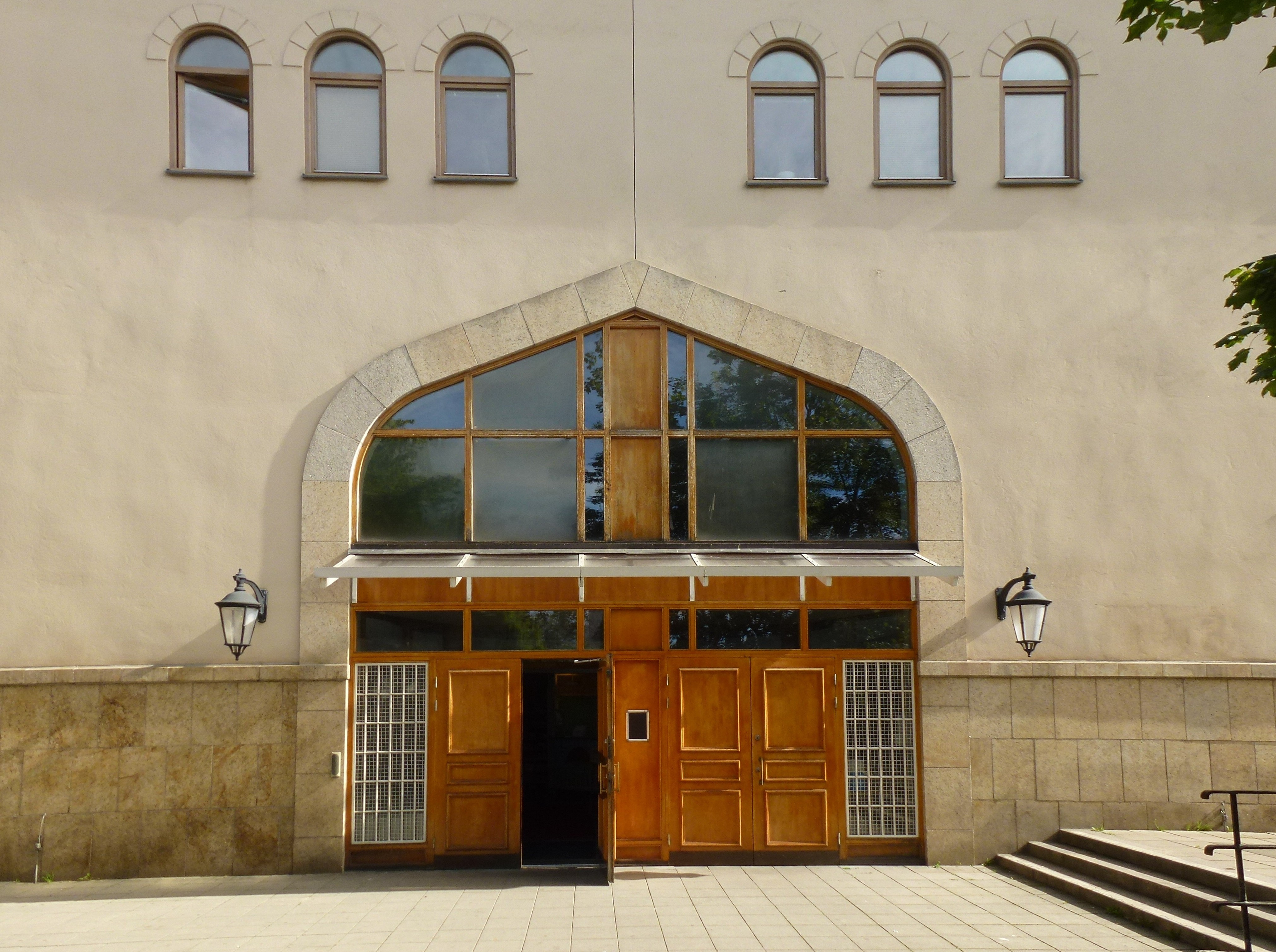 Stockholms moské entré